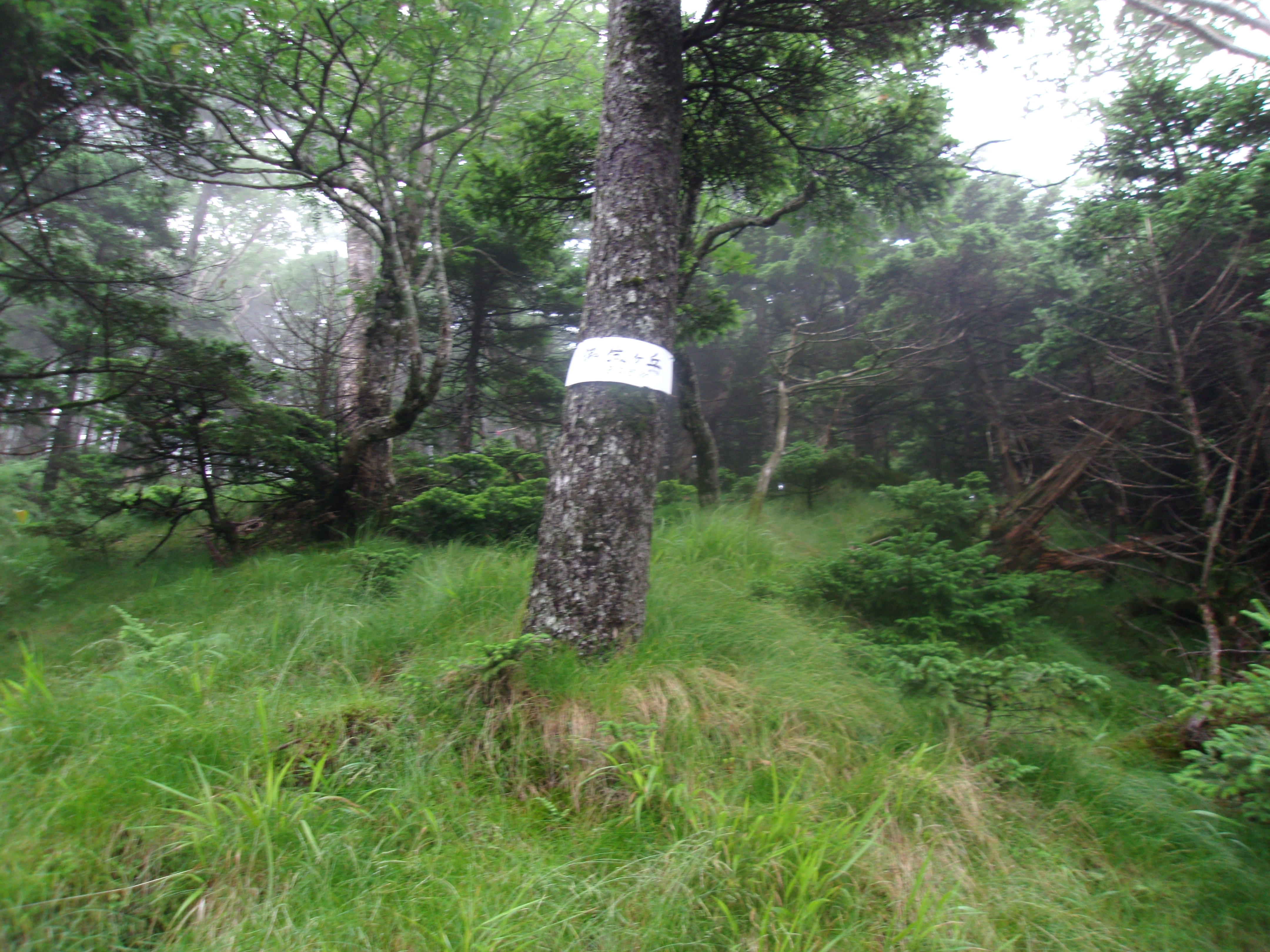 大峯奥駈道第43靡「仏性ヶ岳」